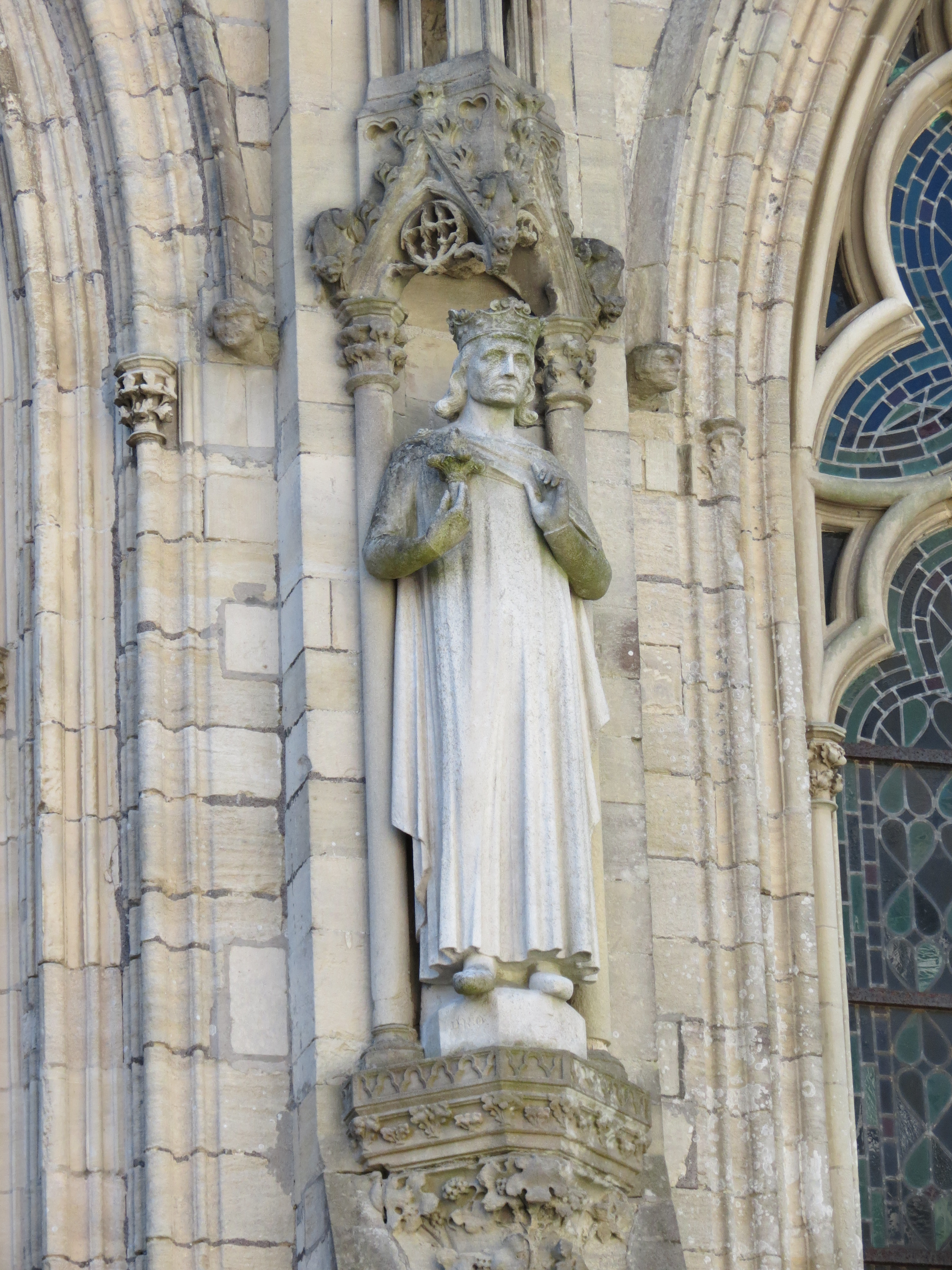 Statue de Drogon de Hauteville datant de 1875, remplaçant celle abîmée à la Révolution.